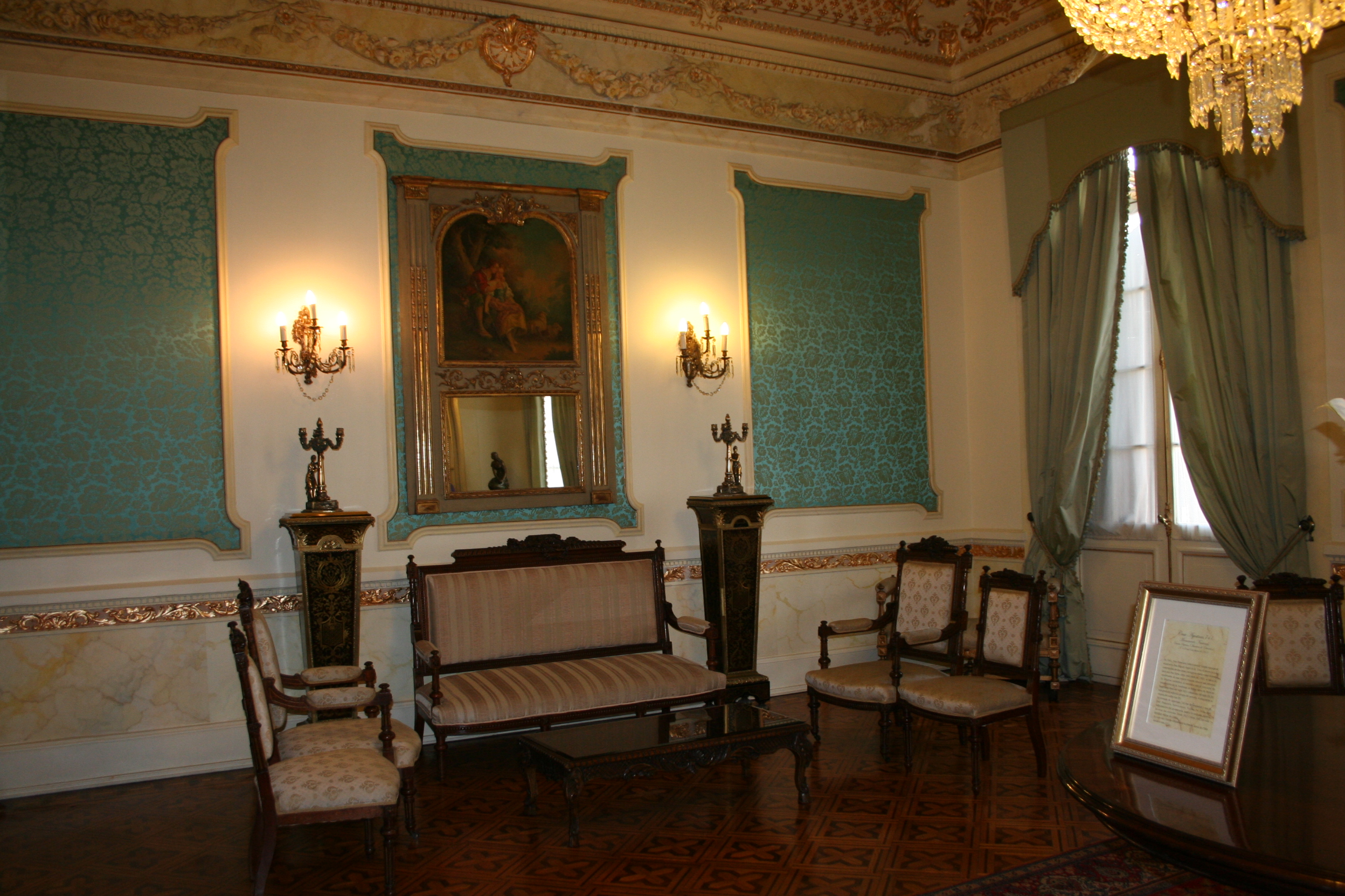 Salón Palacio Subercaseaux. This is a photo of a national monument in Chile: 815